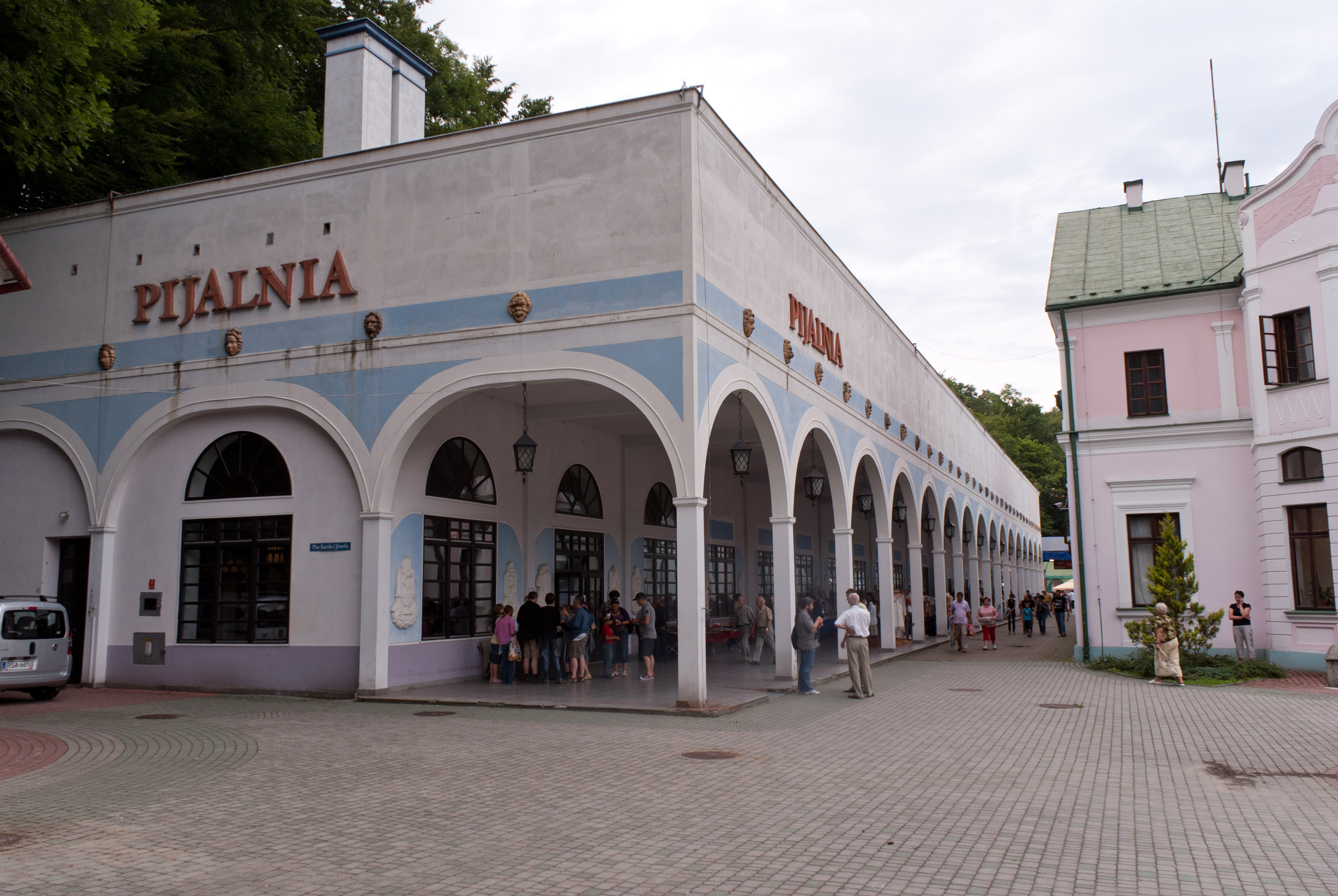 Łazienki borowinowe (tzw. Pijalnia) w Iwoniczu-Zdroju.